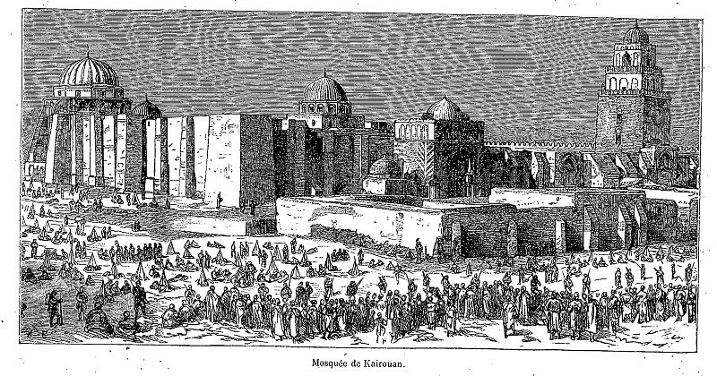 La Grande mosquée de Kairouan